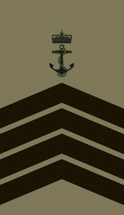 OR8 NOR - Orlogsmester